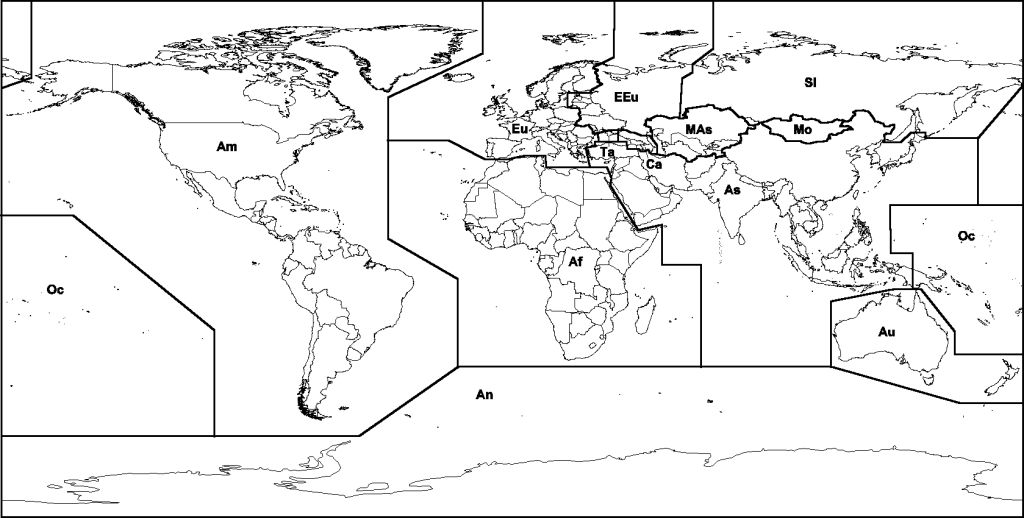 Гербарий Московского университета, отделы гербария